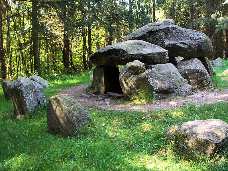 der Teufelsbackofen in der Südgruppe der Großsteingräber im Everstorfer Forst bei Grevesmühlen